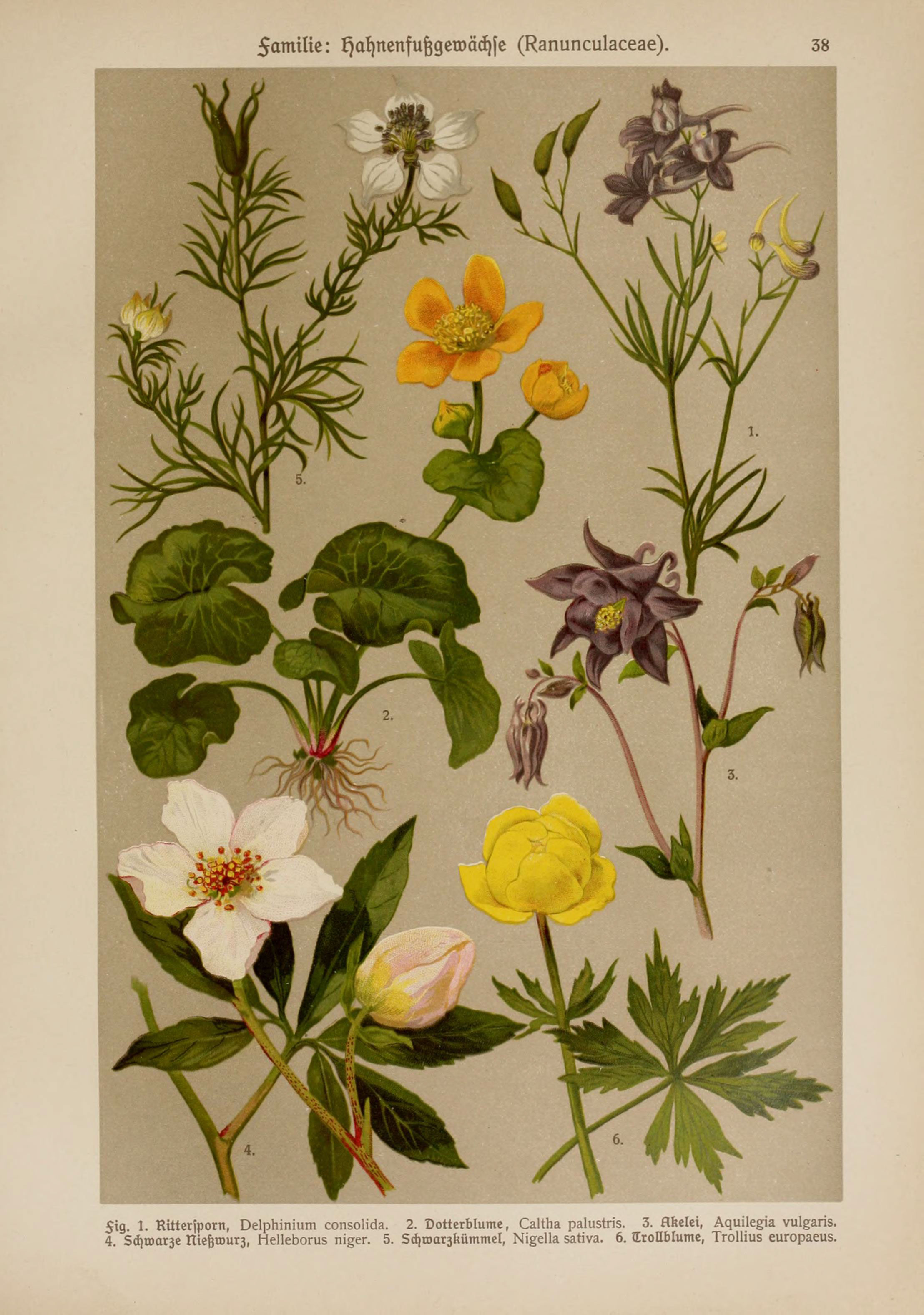 5aTniItc: ^aljncnfufegetDä^fc (Ranunculaceae). 38 Sig. 1. Rüteriporn, Delphinium consolida. 2. Dotterblume, Caltha palustris. 3. flftelei, Aquilegia vulgaris. 4. Sdiroarse nte6tDur3, Helleborus niger. 5. Sdjmarstmmmel, Nigella sativa. 6. tEtoüblume, Troliius europaeus.